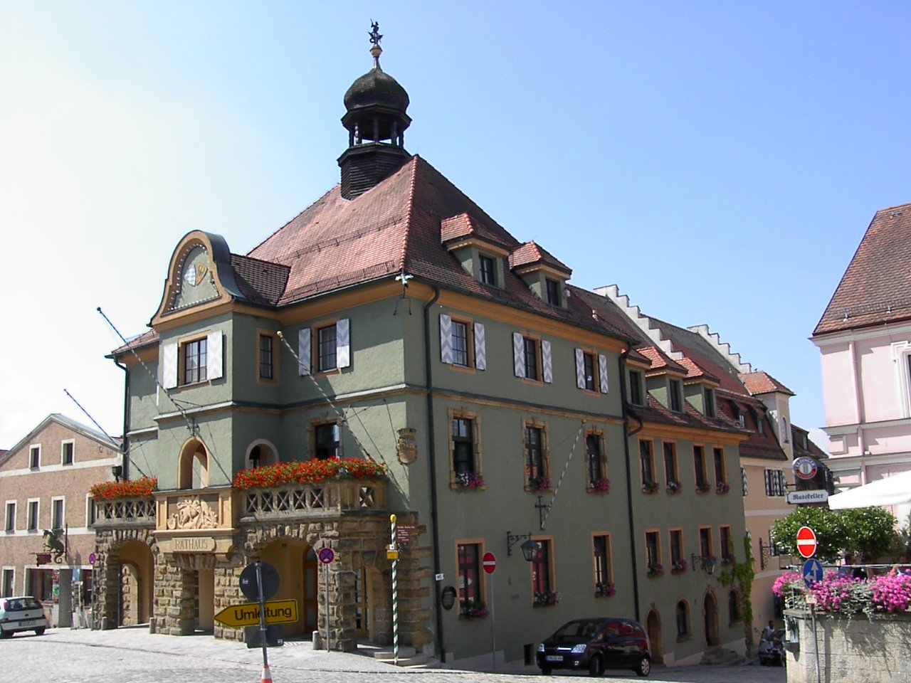 Rathaus in Furth im Wald (Bayern)